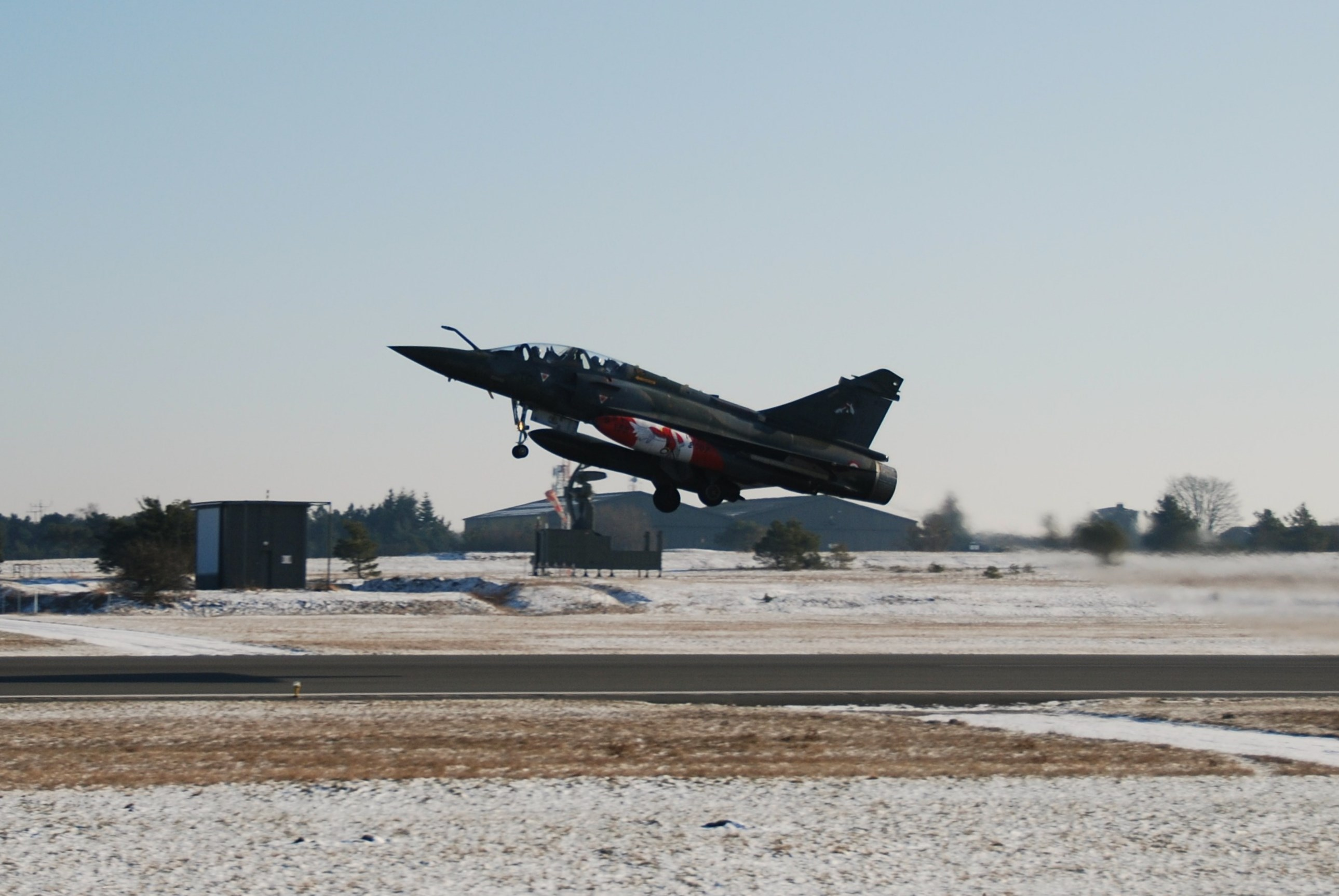 Décollage M2000D de la SPA 153 depuis Nancy